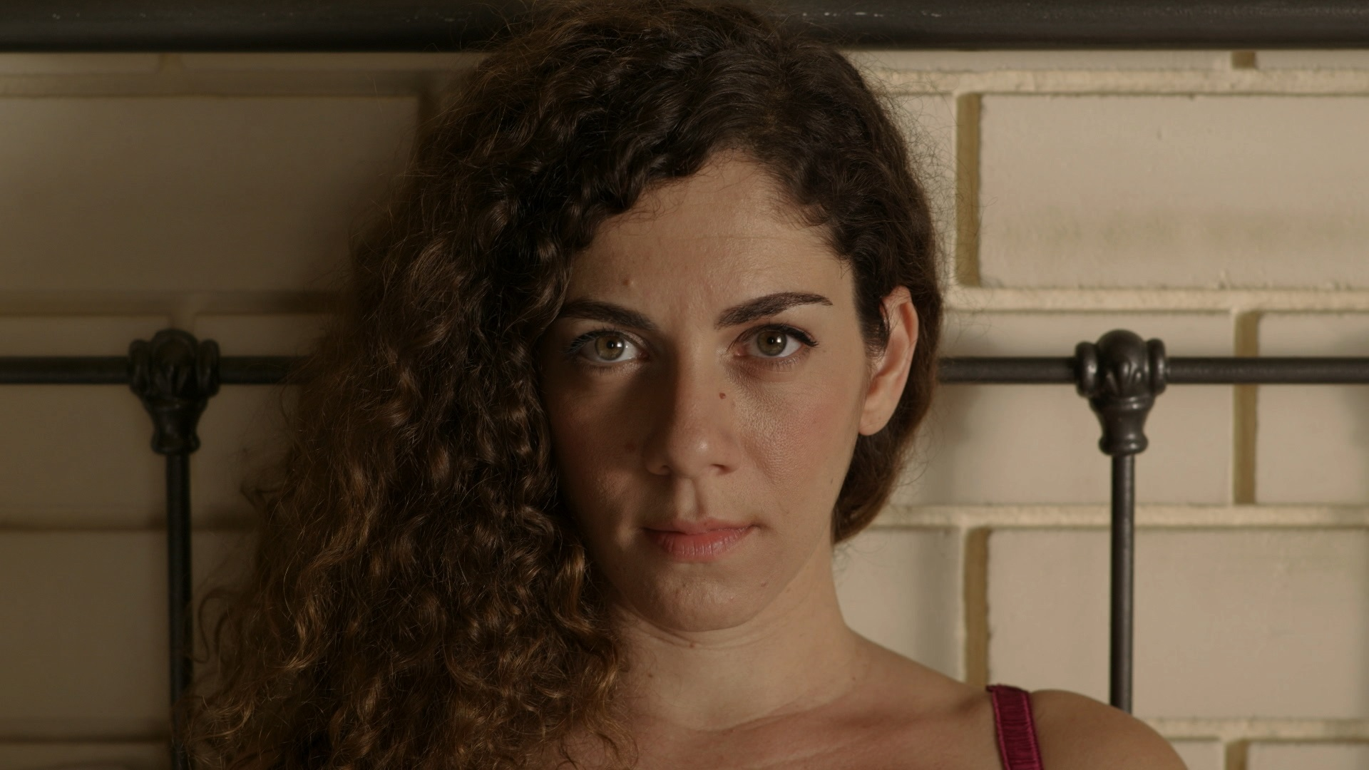 שרון דנון